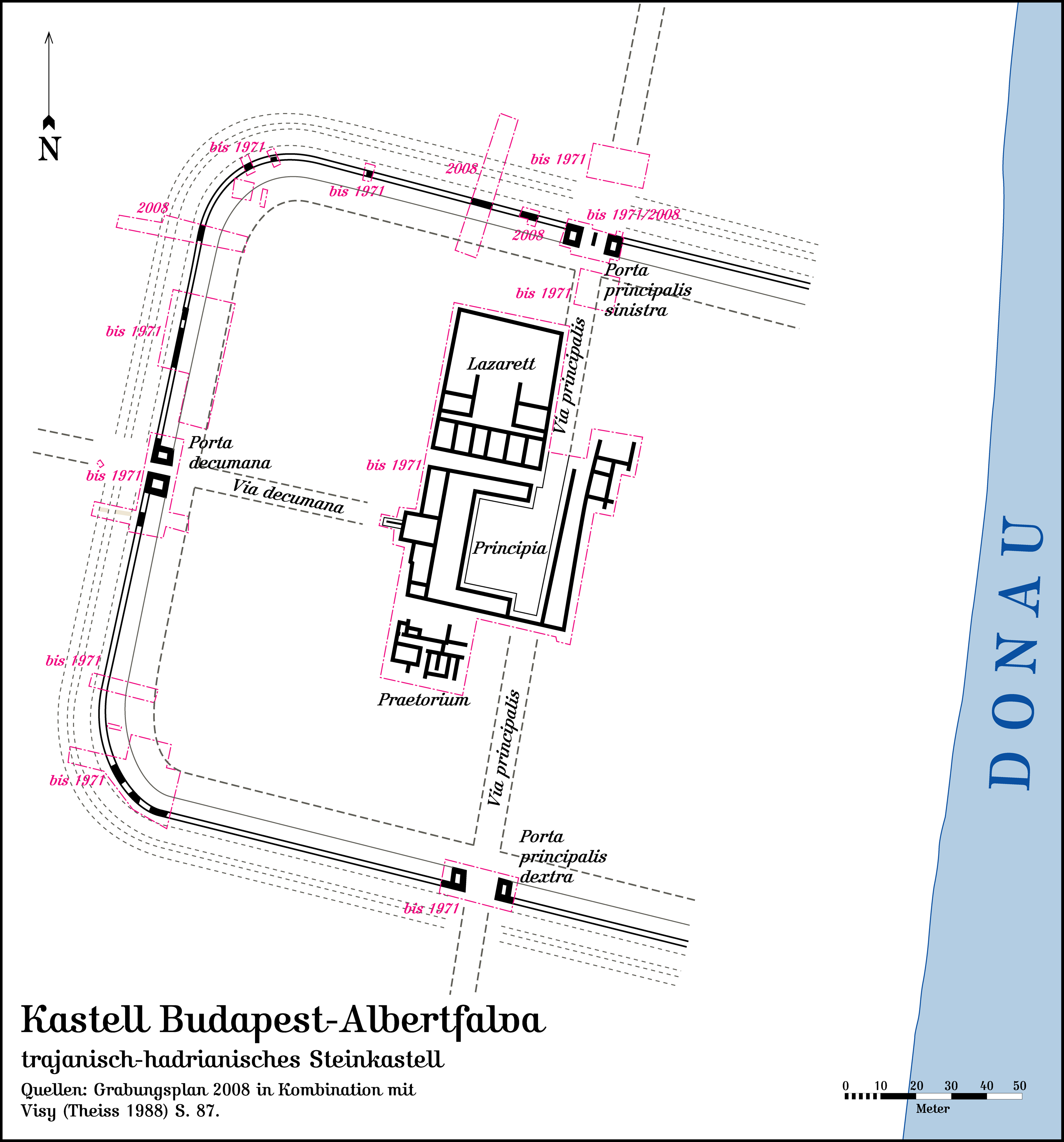 Das Kastell Budapest-Albertfalva nach dem Grabungsplan 2008 kombiniert mit Visy (Theiss 1988), S. 87 und Kastellstandards aus Johnson/Baatz (Zabern 1987).